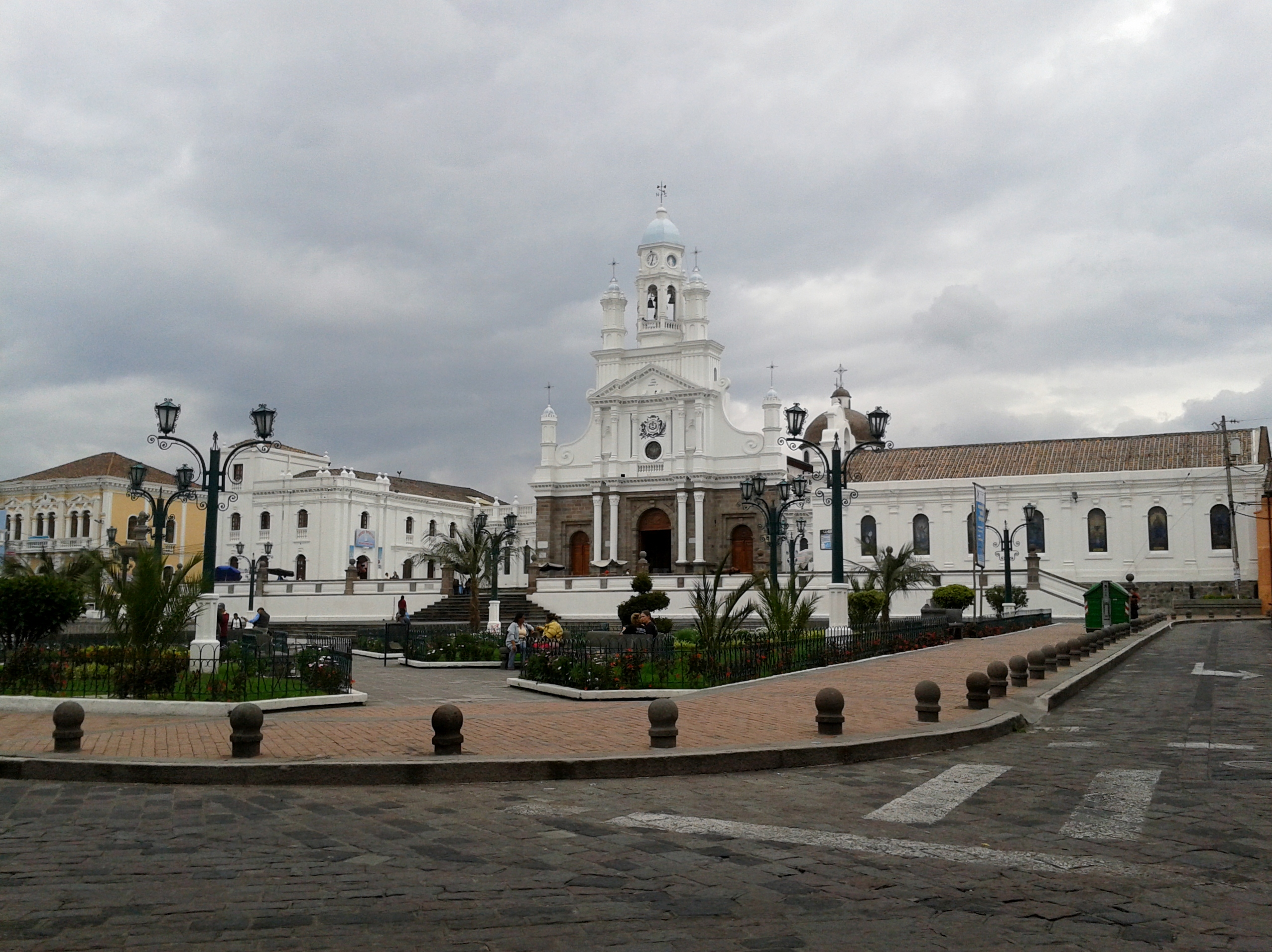 Vista Iglesia de Sangolqui y Parque Juan de Salinas